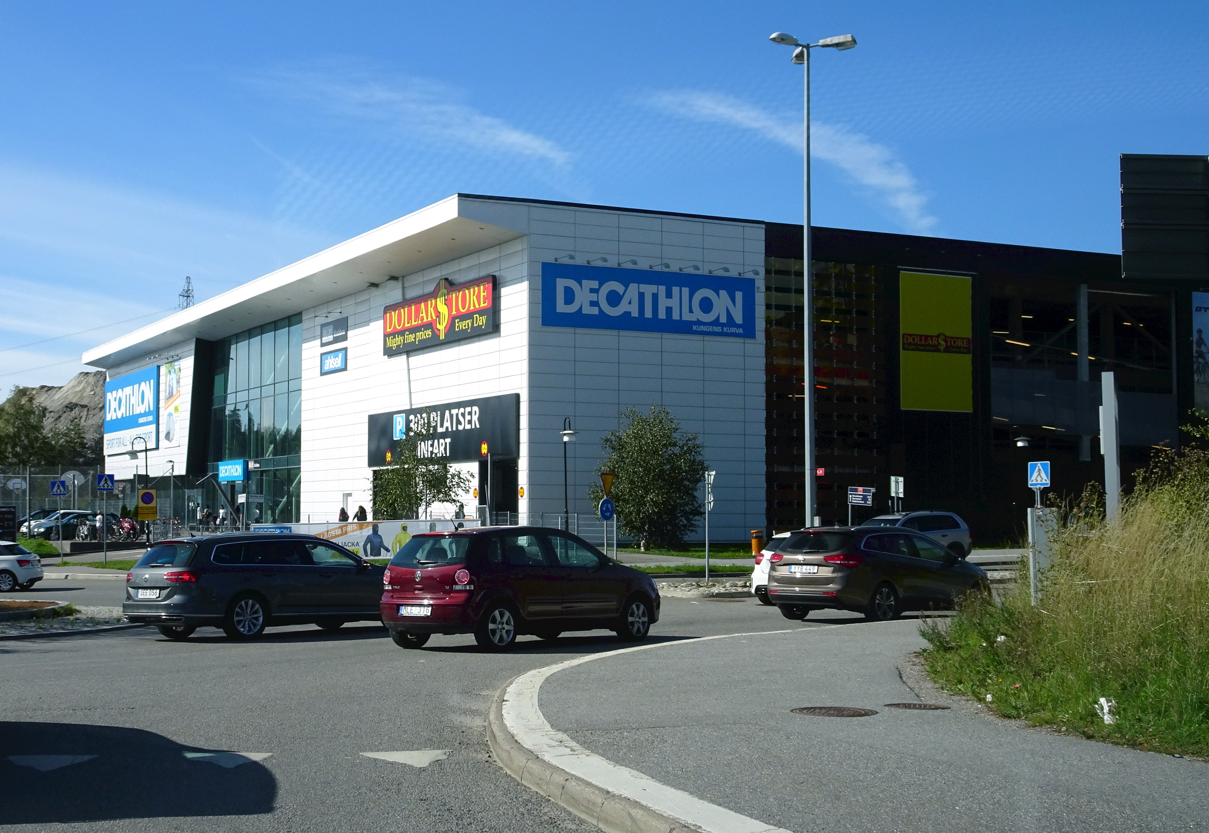 Decathlon, Kungens kurva